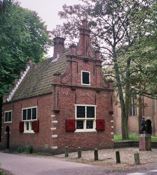 Raadhuisje in Schoorl, Noord-Holland, Nederland